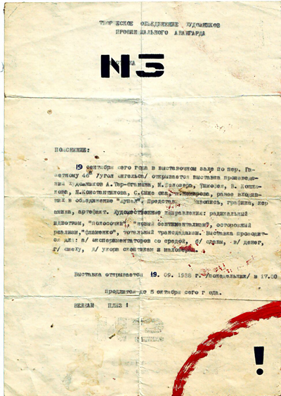 Афиша выставки "Провинциальный авангард". Ростов-на-Дону, 1988.